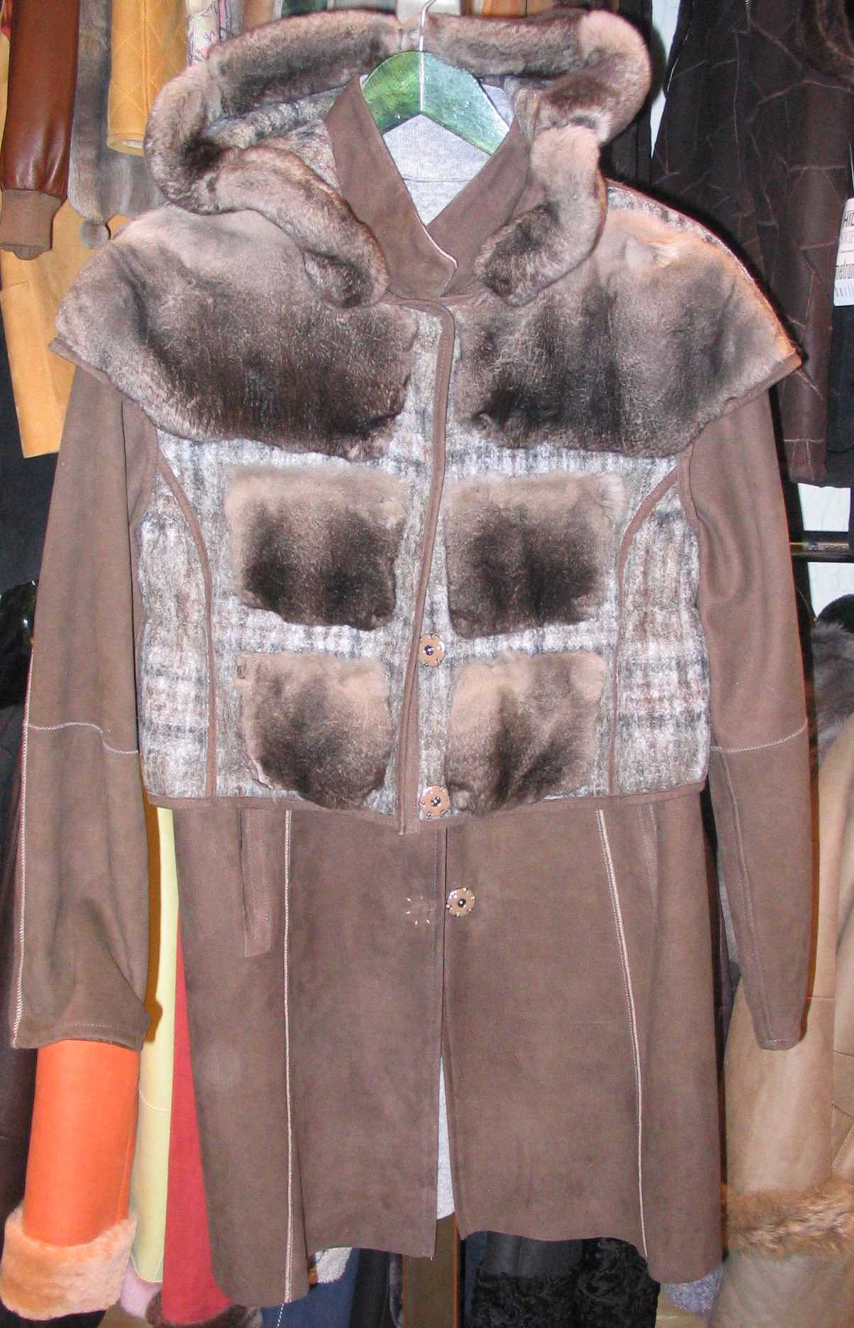 Jacke mit Orylag-Kaninfell. Gesehen im Pelzhaus Schad, Ludwigshafen.